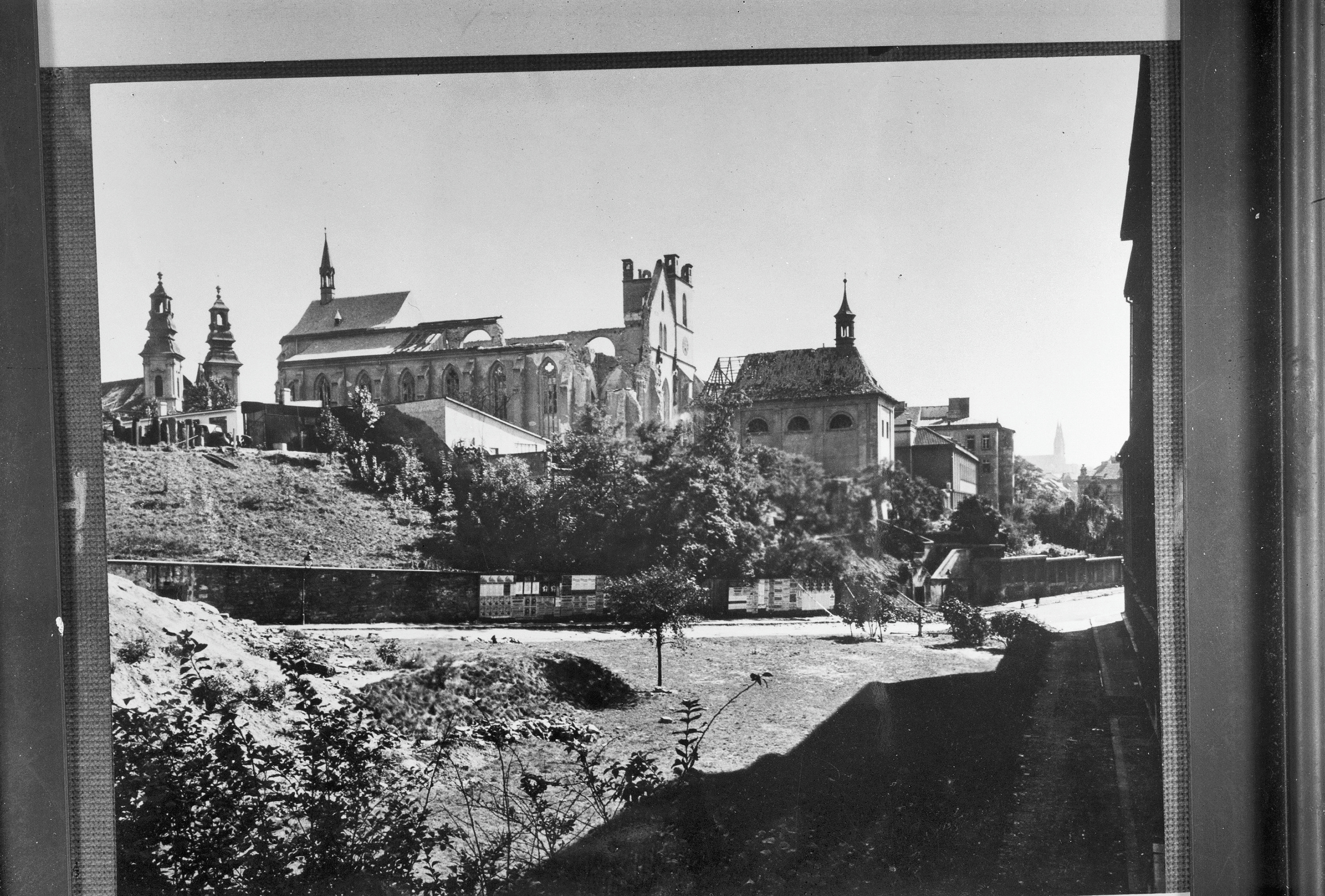 Emmauskerk: Emmauskerk, overzicht